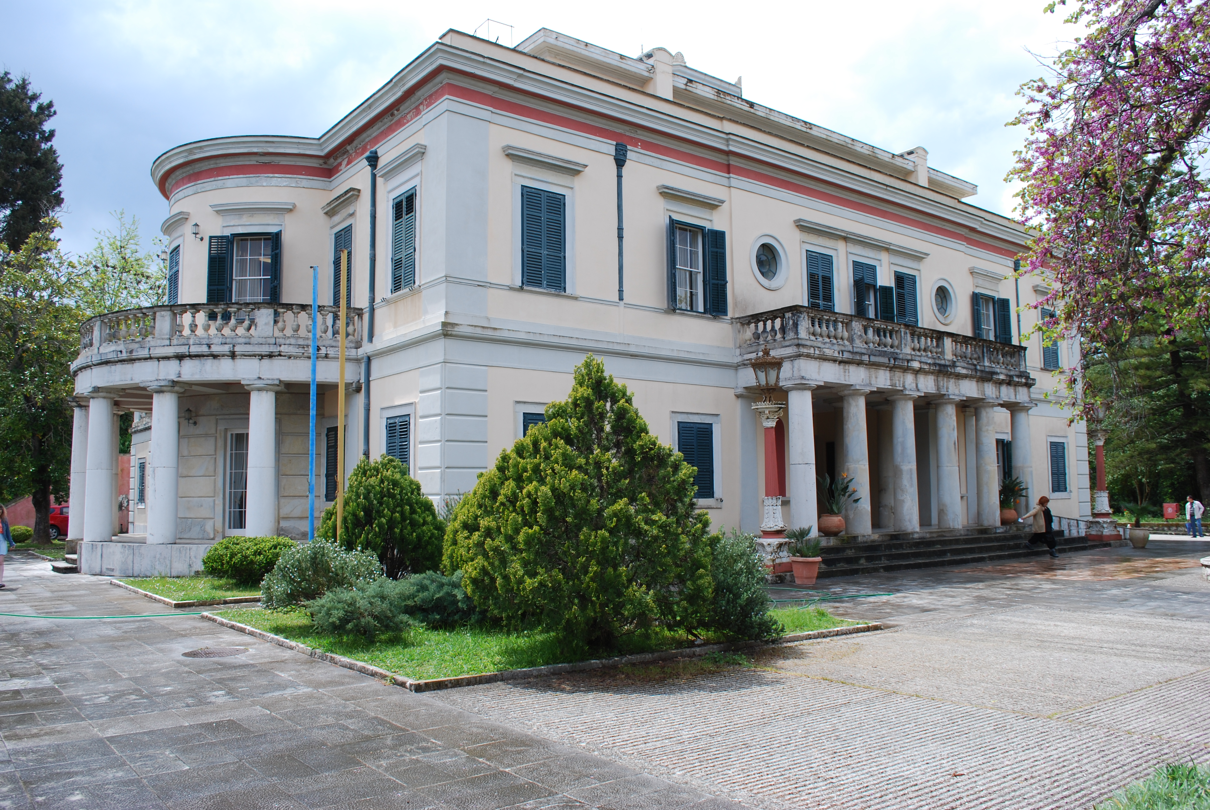 Vue de la villa "Mon Repos" à Corfou.